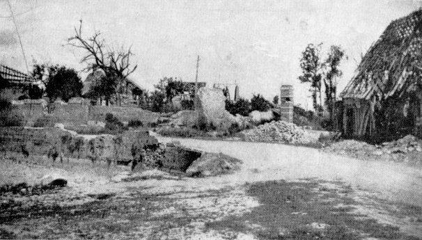 Une rue de Misery (1920). Première Guerre mondiale, destructions.